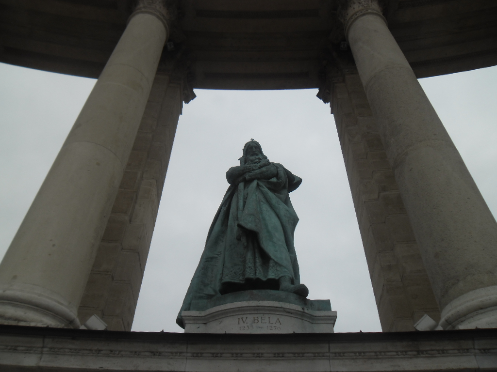 prikaz ugarsko-hrvatskog kralja Bele IV. na Trgu heroja u Budimpešti